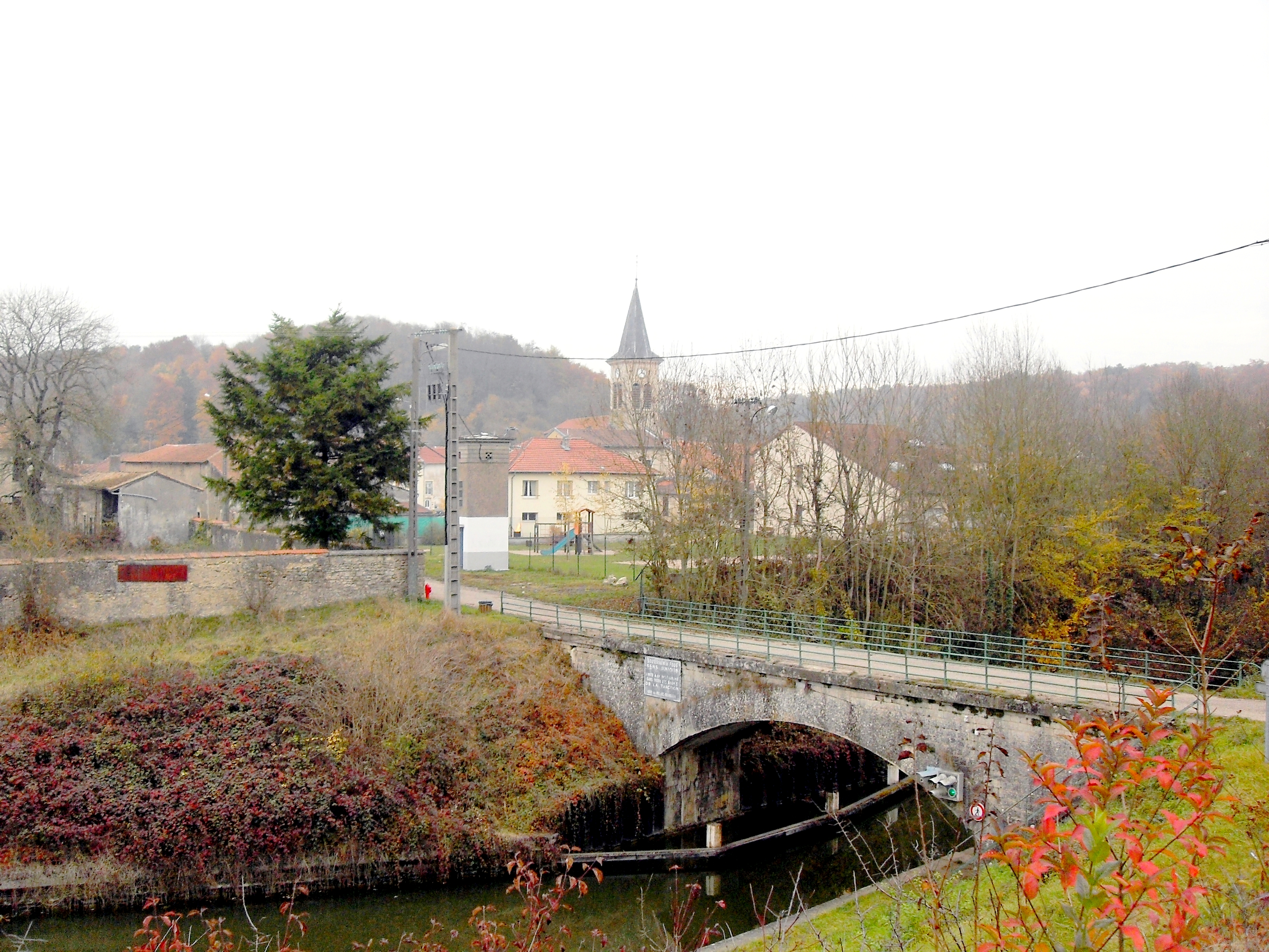 Lay-Saint-Remy Meurthe et Moselle (54) - l'église vue depuis le talus du canal de la Marne eu Rhin